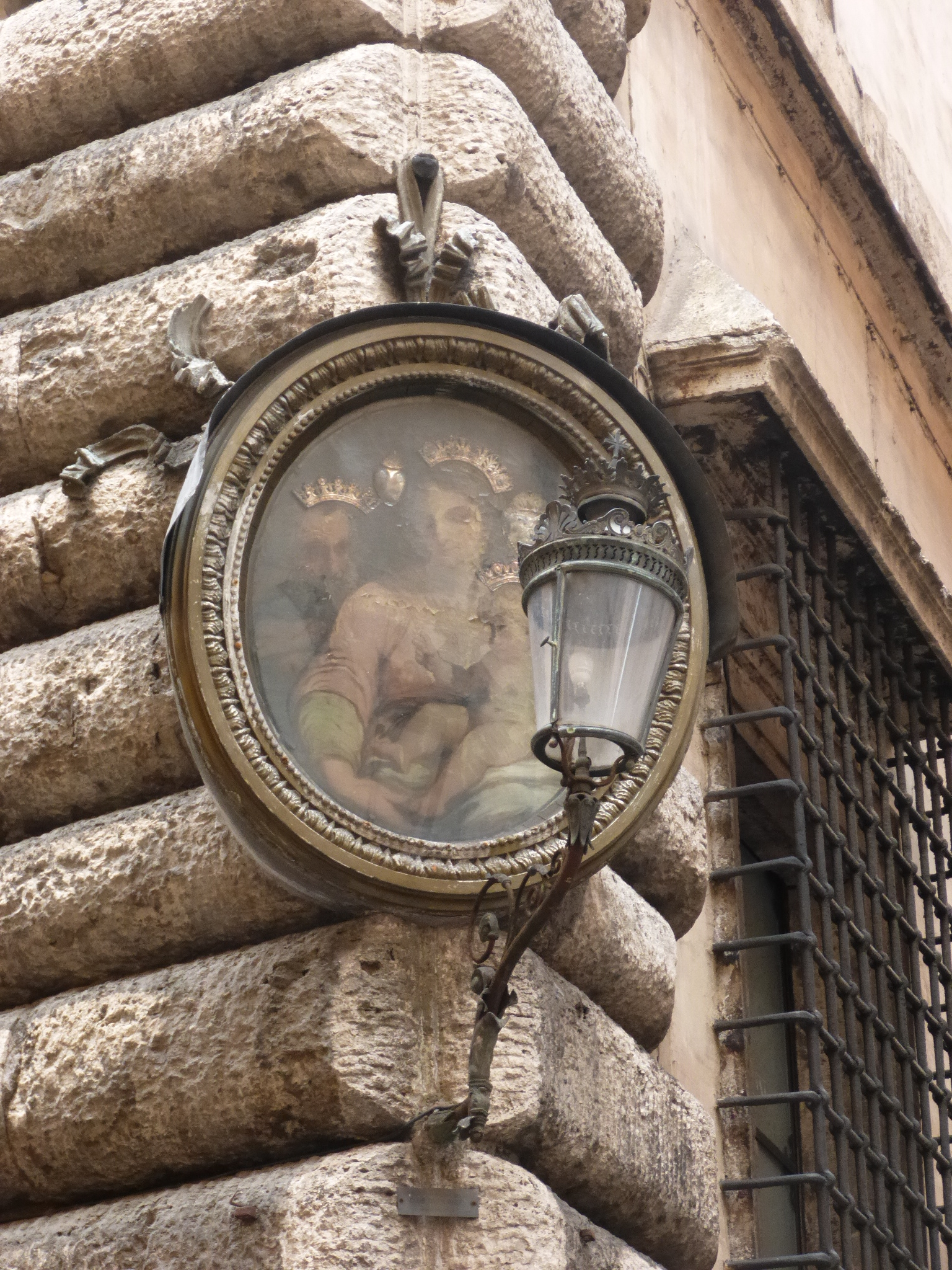 Roma, madonnella a via de' Nari angolo Torre Argentina